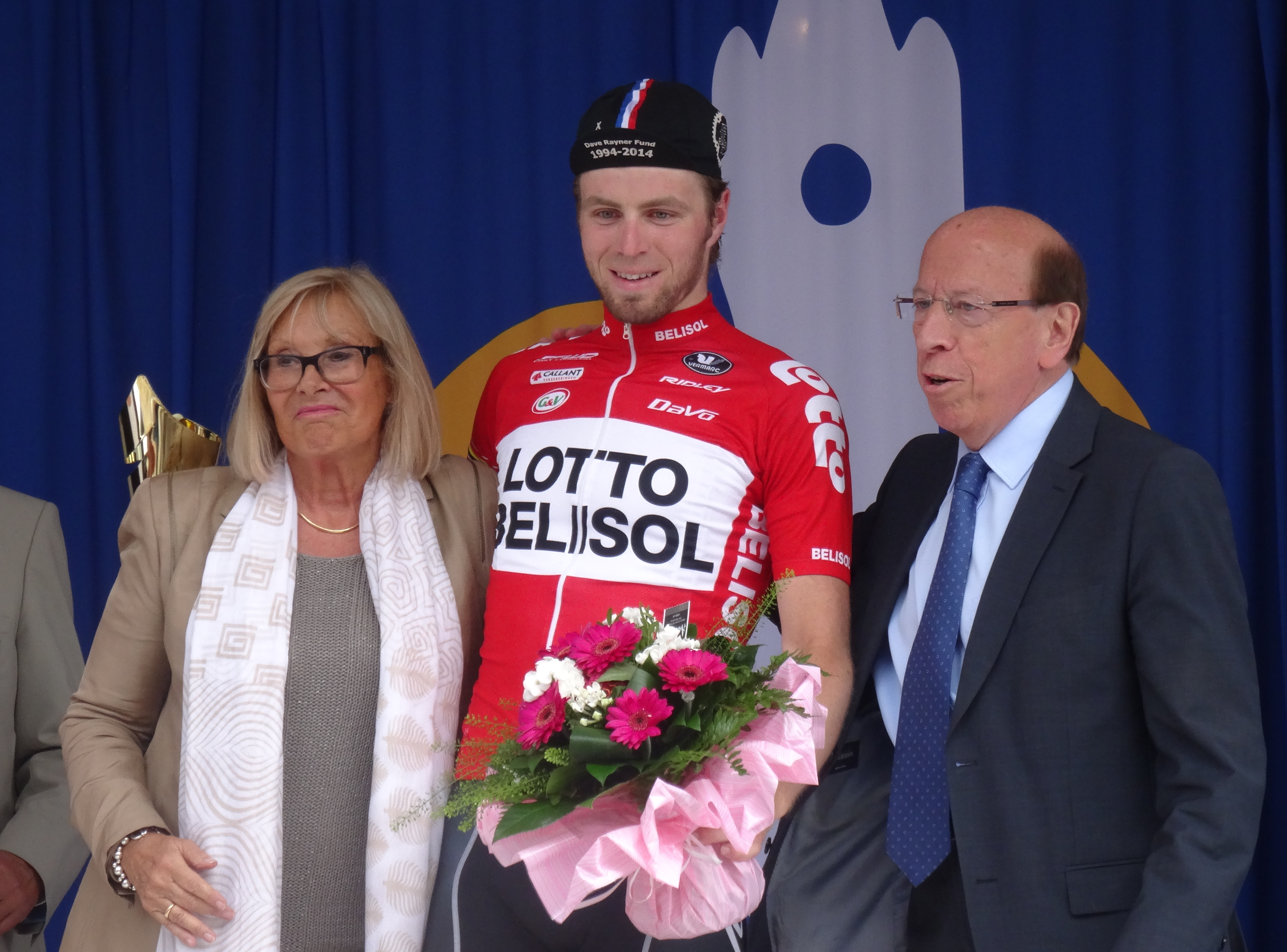 Reportage photographique réalisé le dimanche 25 mai 2014 à l'occasion du départ et de l'arrivée de la troisième étape du Paris-Arras Tour 2014 à Arras, Pas-de-Calais, Nord-Pas-de-Calais, France. Depicted person: Daniel McLay